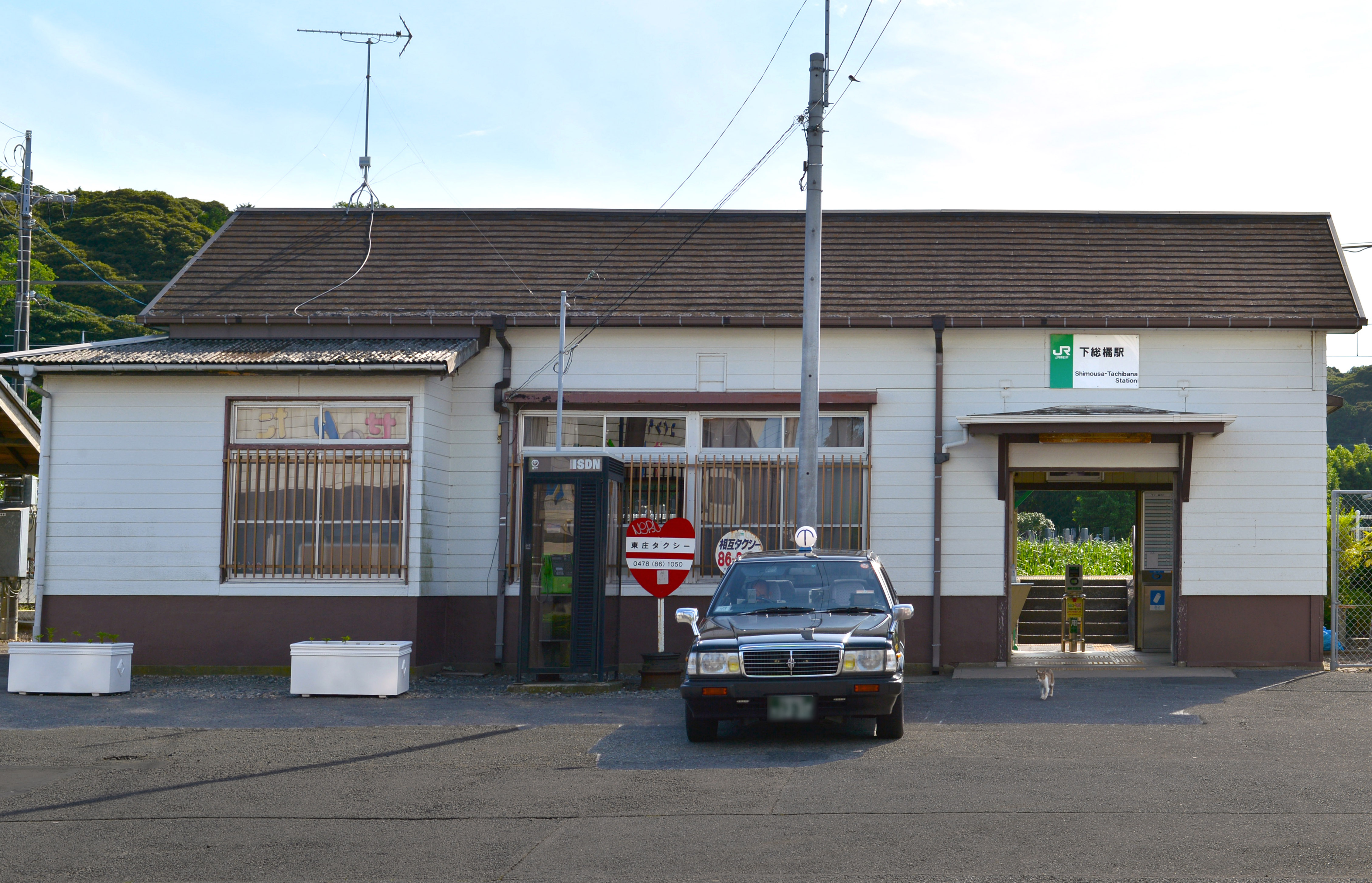 JR下総橘駅の駅舎